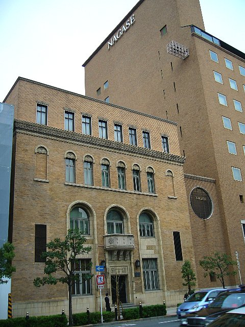 長瀬産業本館ビル（大阪市西区） 昭和3年（1928年）建築 右側は新館